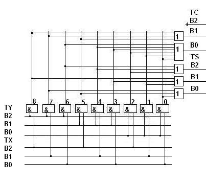 Троичный трёхбитный одноединичный полусумматор.